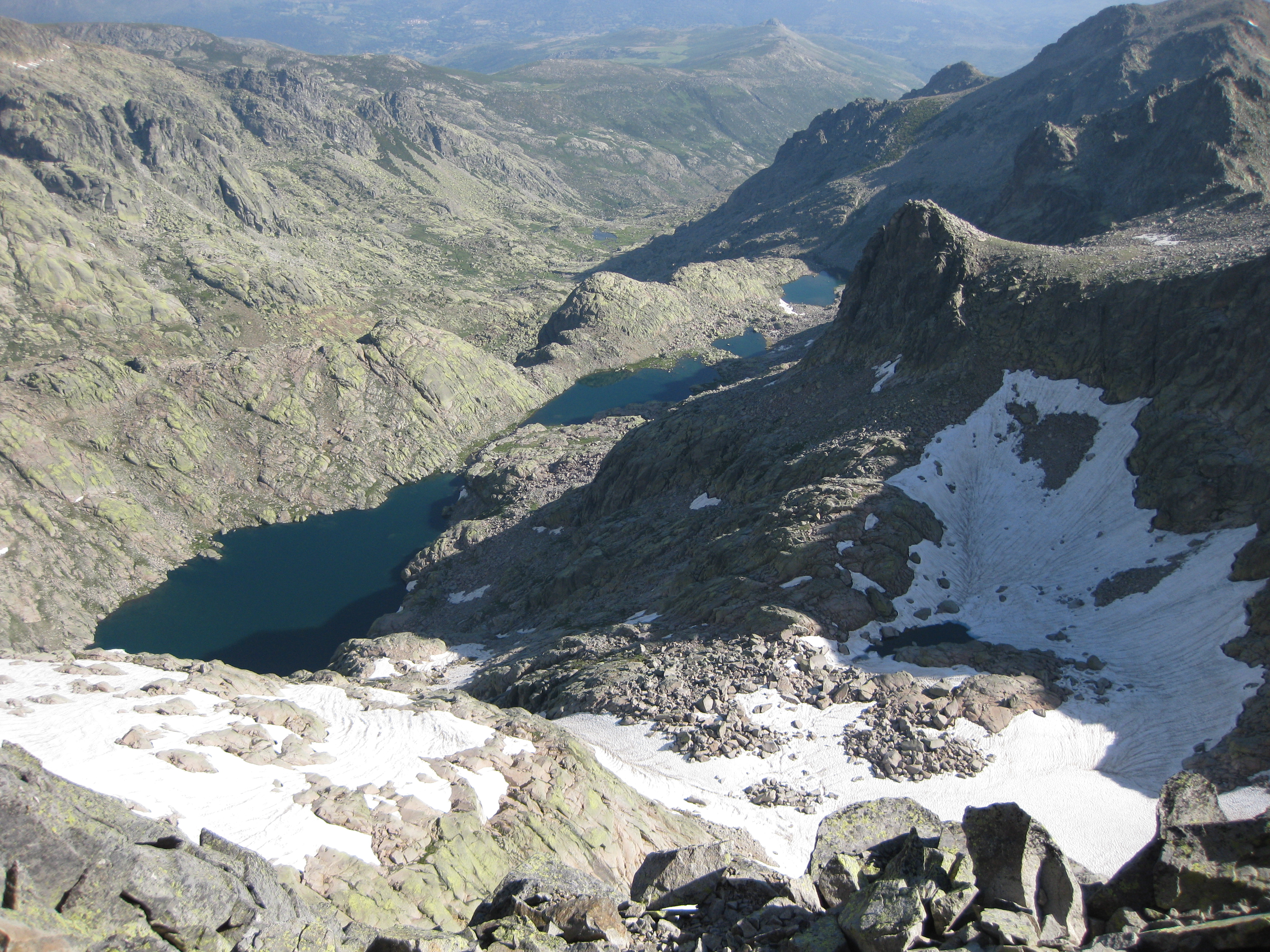 Circo de Cinco Lagunas - desde el nevero de la Galana, 04-07-2010